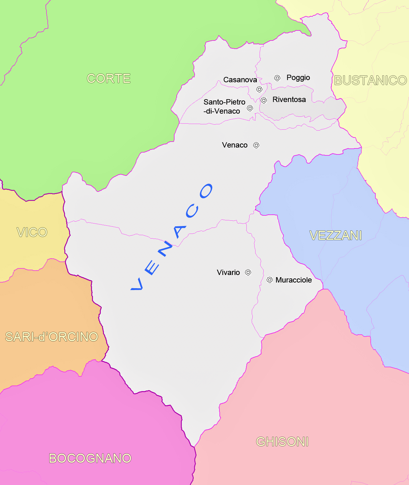 Carte du canton de Venaco (Corse)